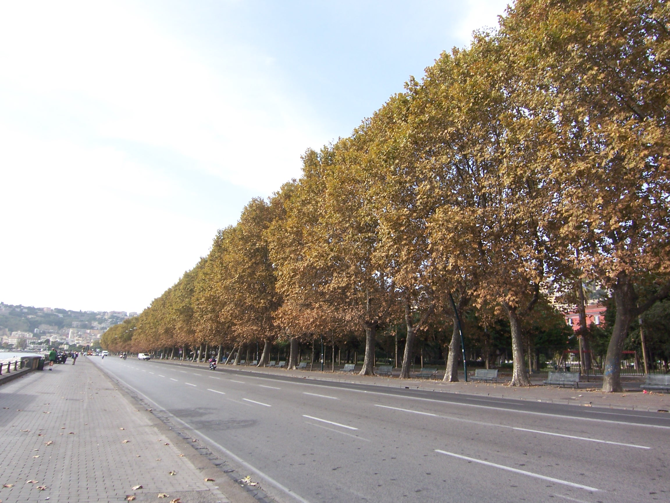 Via Caracciolo, Napoli